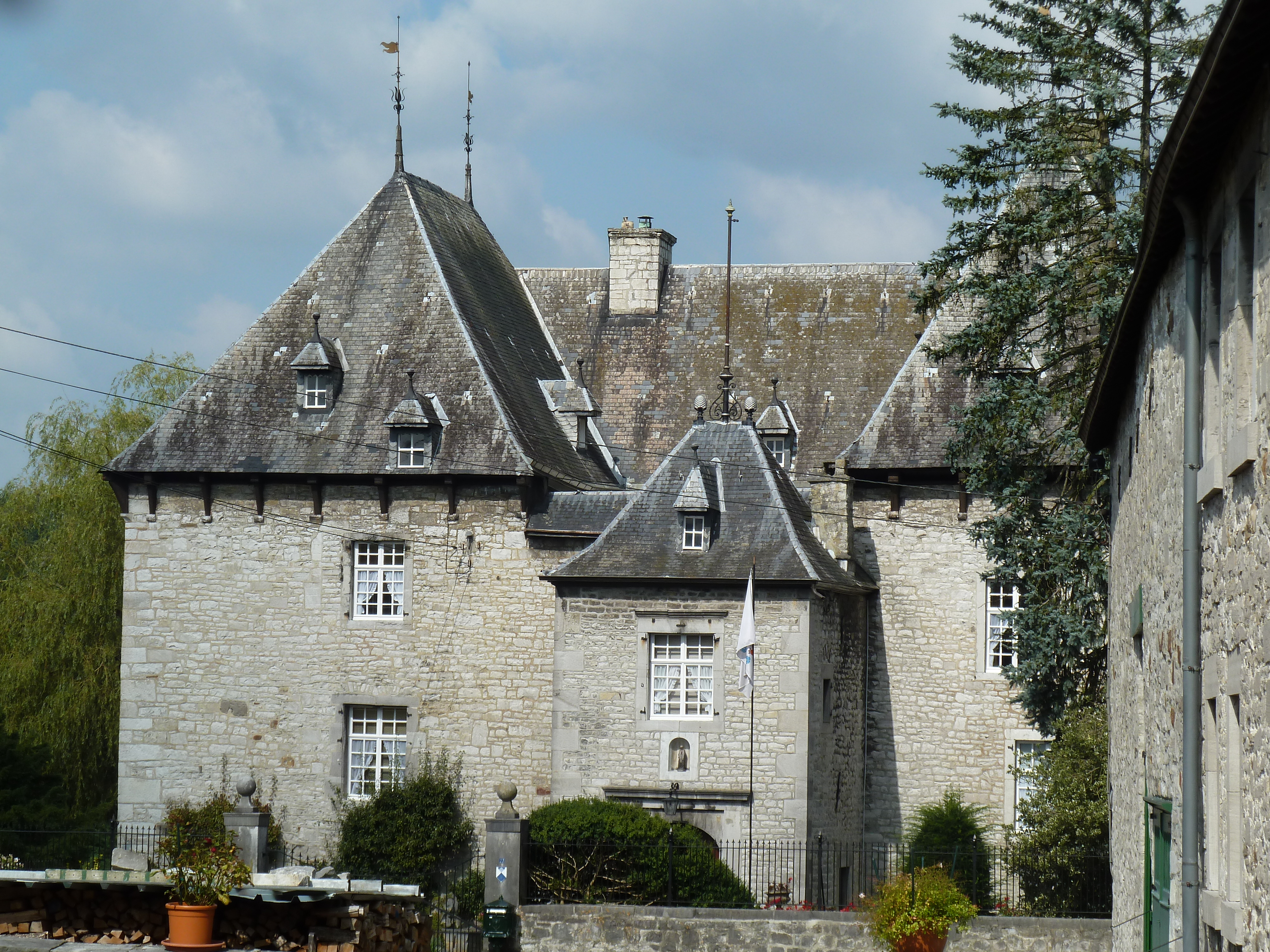 Huis Amstenrath, Eynatten, Raeren, België